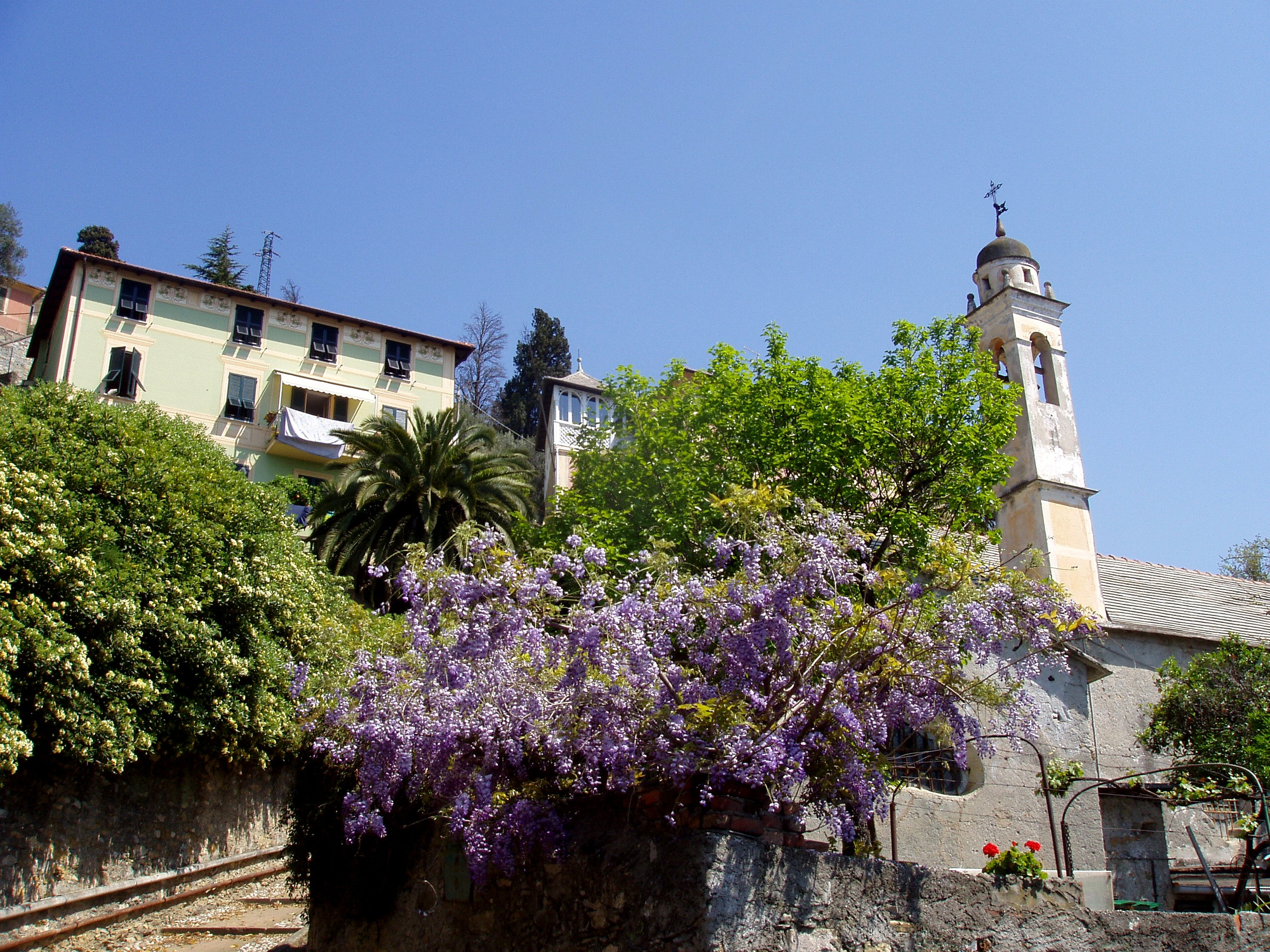 Chiesa di San Nicolò, Sant'Ilario, Genova, Liguria, Italia